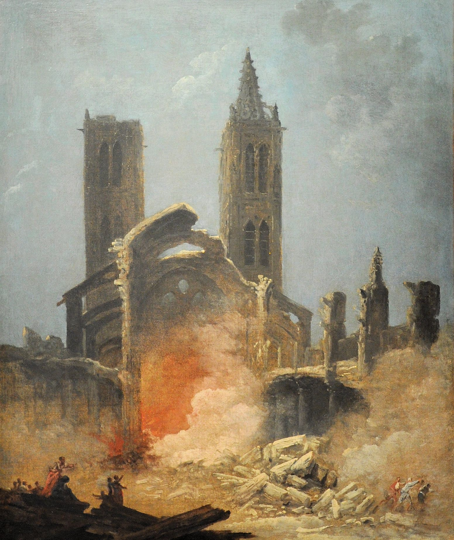 Démolition de l'église Saint-Jean-en-Grèvetitle QS:P1476,fr:"Démolition de l'église Saint-Jean-en-Grève" label QS:Lfr,"Démolition de l'église Saint-Jean-en-Grève"